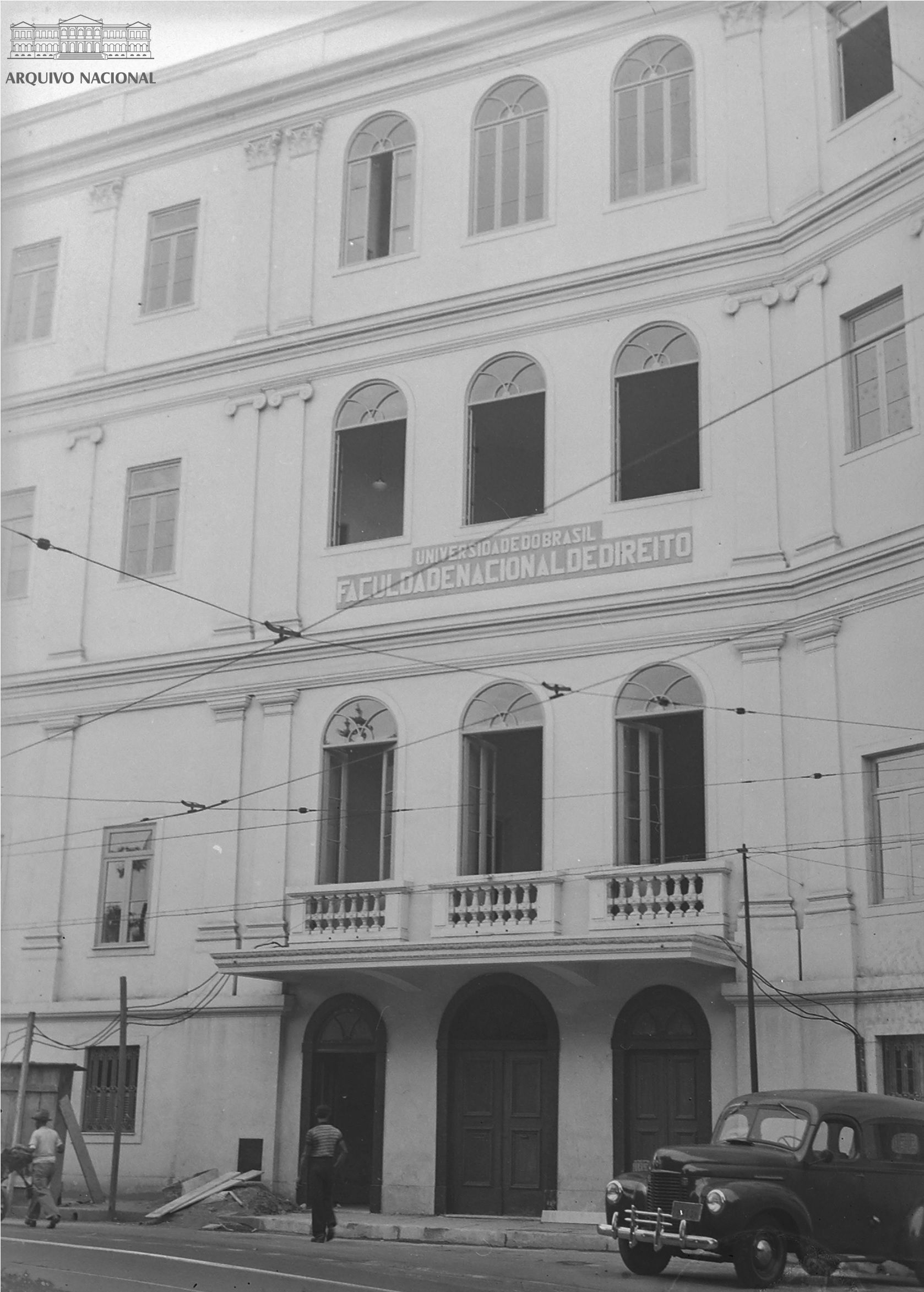 Fachada da Faculdade Nacional de Direito, da Universidade do Brasil (atual UFRJ), março de 1949. Arquivo Nacional.